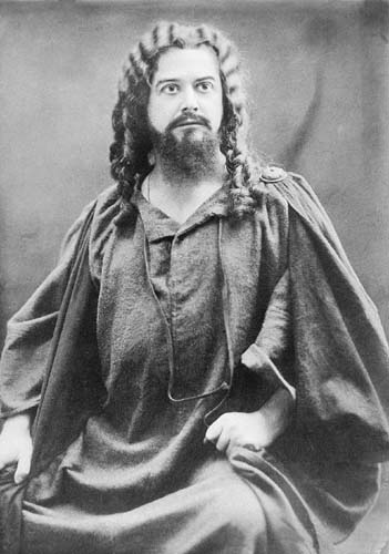 Anthes György (1863 – 1922) német operaénekes (tenor), kora egyik nagy Wagner-énekese, a magyar operatörténelem nagy alakja, Budapesten a Zeneakadémia tanára, az Operaház főrendezője.